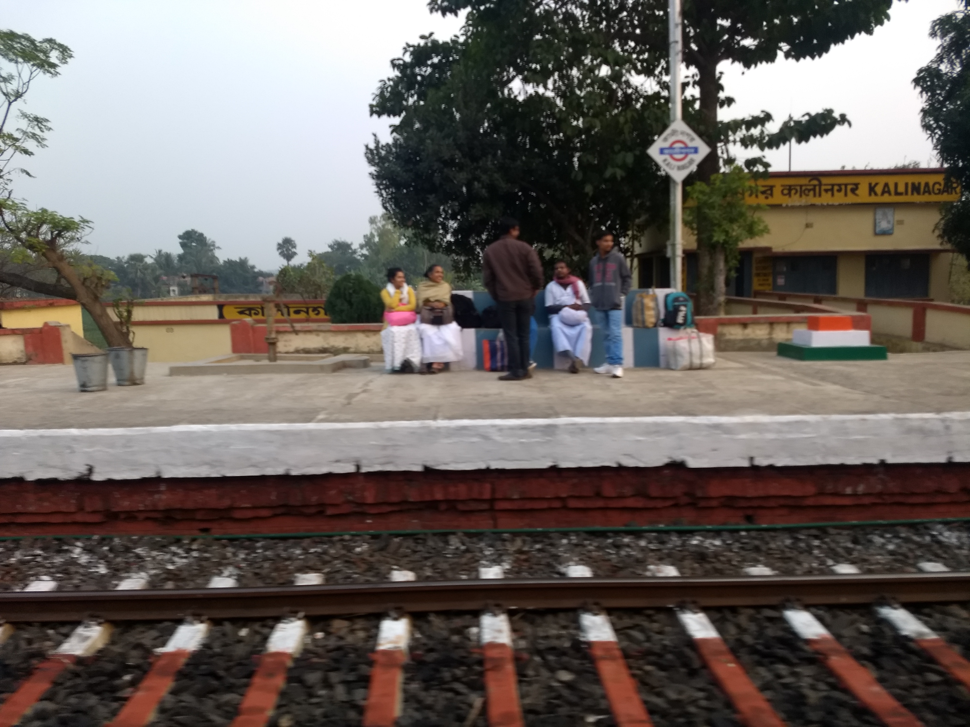 Kalinagar railway station